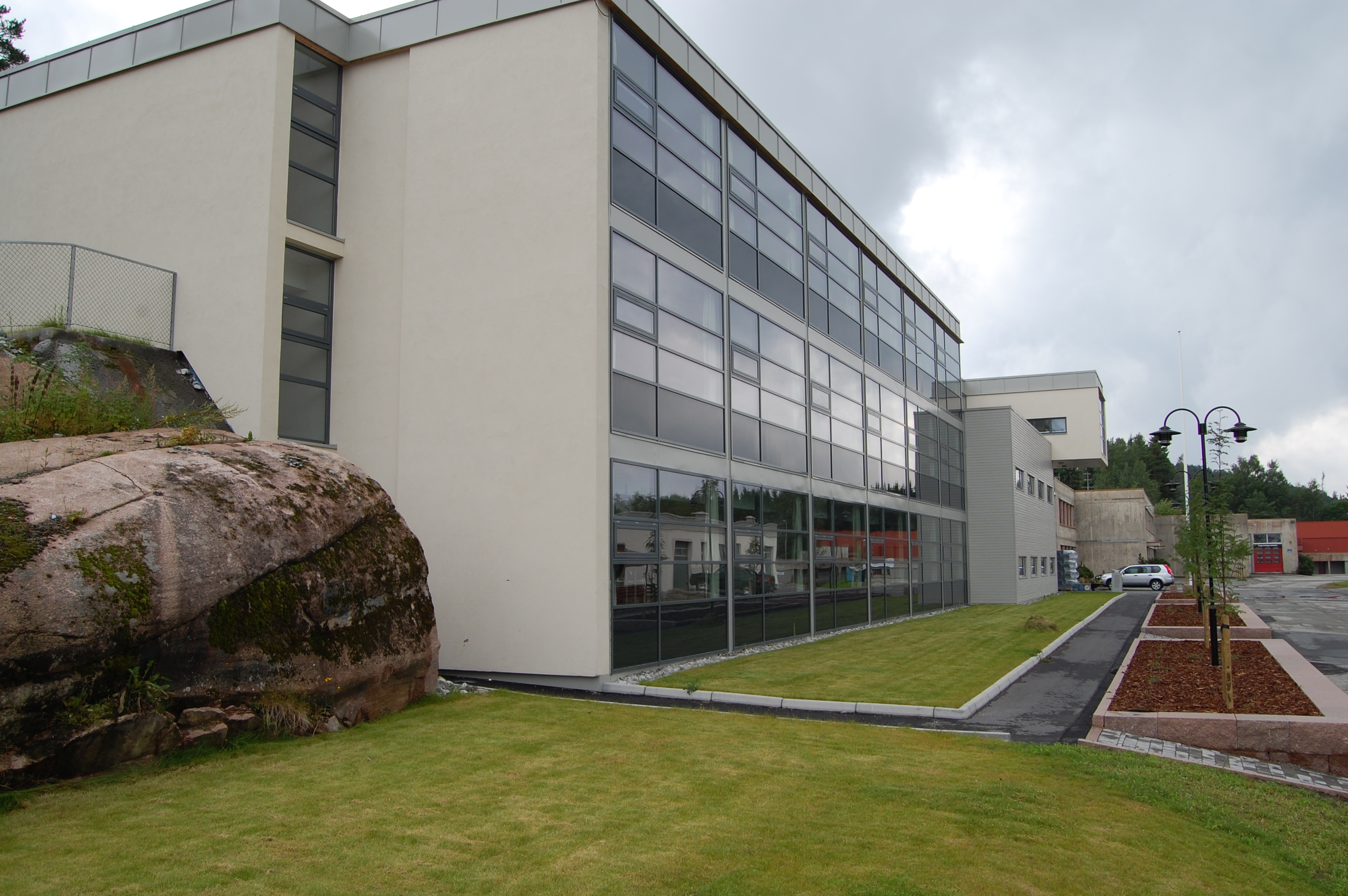 Røyken videregående skole